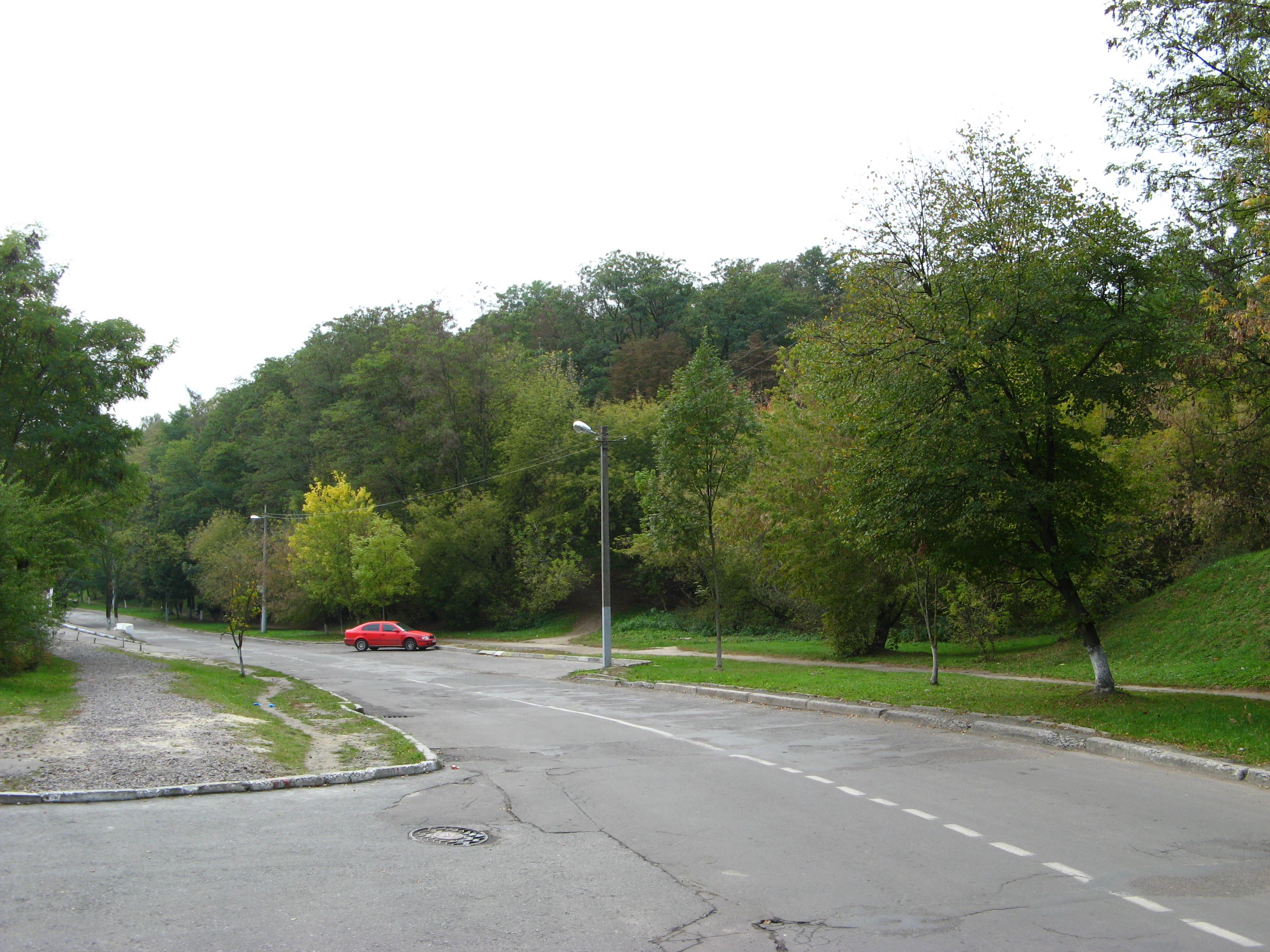 Замарстинівський_парк: Замарстинівський парк біля вул. П. Орлика